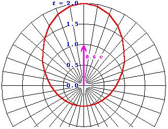 Relativistischer Dopplereffekt und Richtung Für Computer geeignete Schreibweise der Gleichung: f=QWURZEL(1-(v/c)^2)/(1-(v/c)*COS(Winkelgrade*ARCTAN(1)/45)) Als Geschwindigkeit wurden 60 Prozent der Lichtgeschwindigkeit angenommen, also 0,6 c. f ist der Faktor um den sich die Frequenz verändert. Externer Link